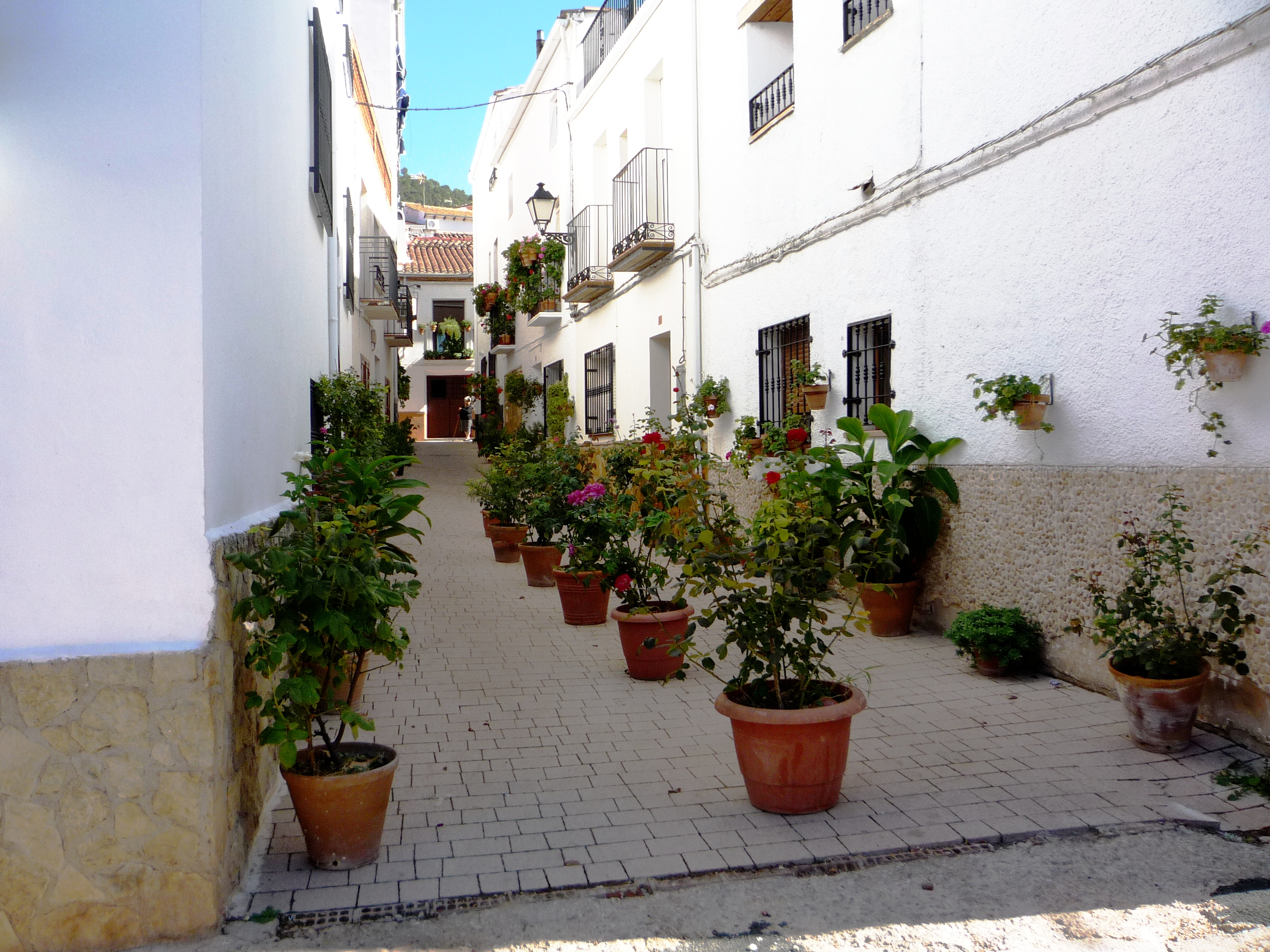 Blumenpracht in den schmalen Gassen und Plätzchen der Altstadt von Hornos. See more about in a related article (DE) of my travelblog.